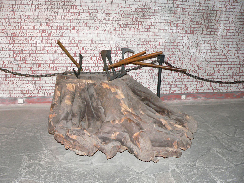 Пън на който палачите отсичали главите на невинните жертви